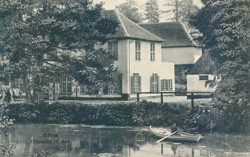 Dwór IV, ulica Polanki, Gdańsk-Oliwa.